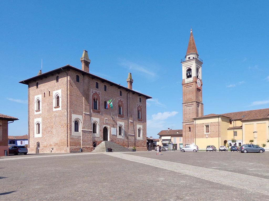 Borghetto Lodigiano, piazzale Carlo Alberto dalla Chiesa con il palazzo Rho (a sinistra) e il campanile della chiesa parrocchiale.